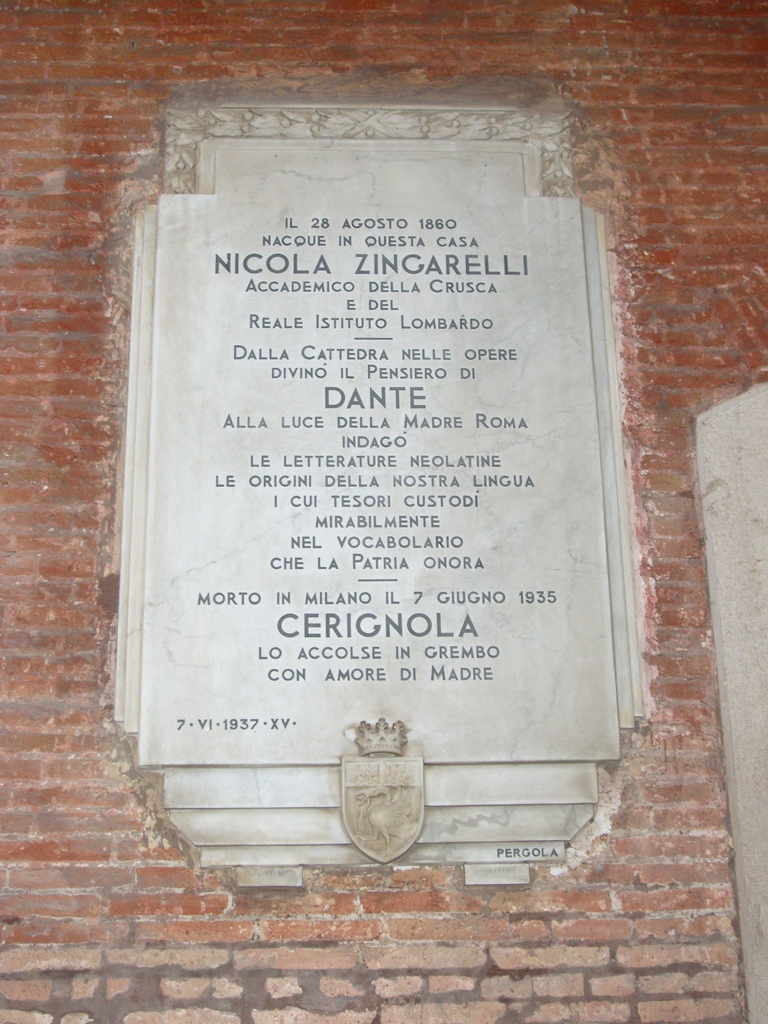 Lapide Commemorativa dedicata a Nicola Zingarelli sulla facciata della sua casa di Cerignola (FG).